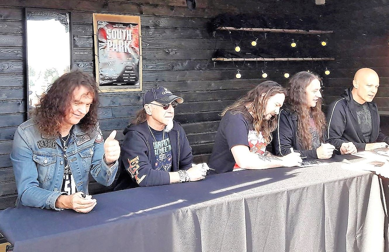 Accept fanitapaamisessa South Parkissa vuonna 2018. Kuvassa vasemmalta basisti Peter Baltes, laulaja Mark Tornillo, rumpali Christopher Williams, kitaristit Uwe Lulis ja Wolf Hoffmann